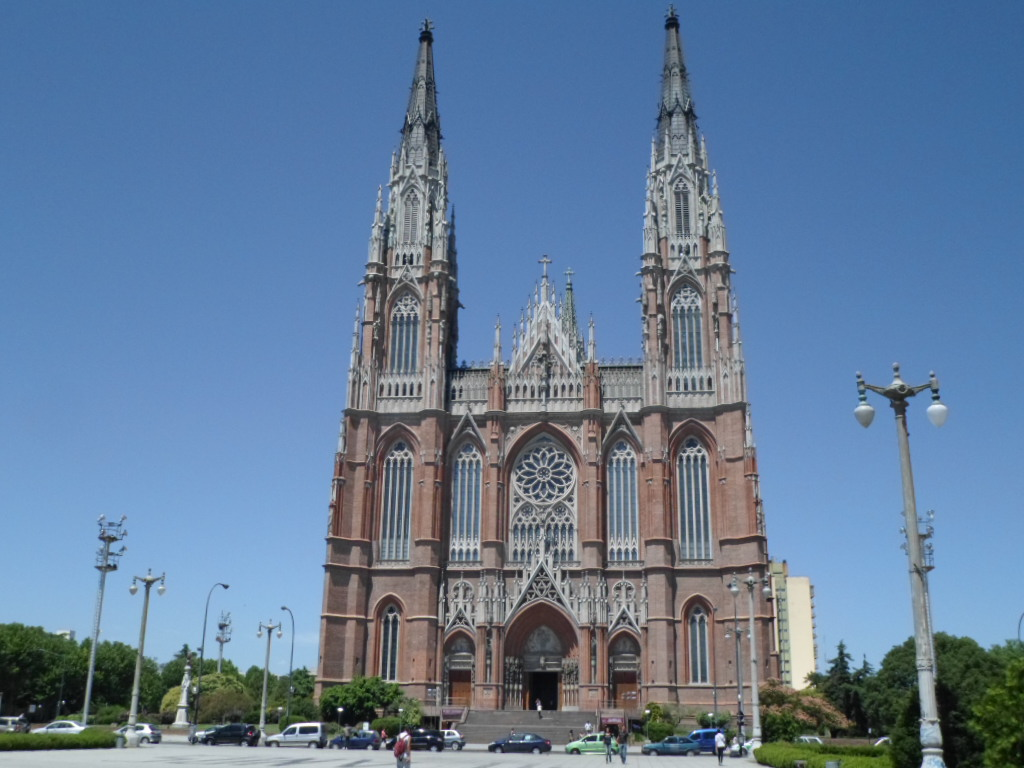 asasasasasas